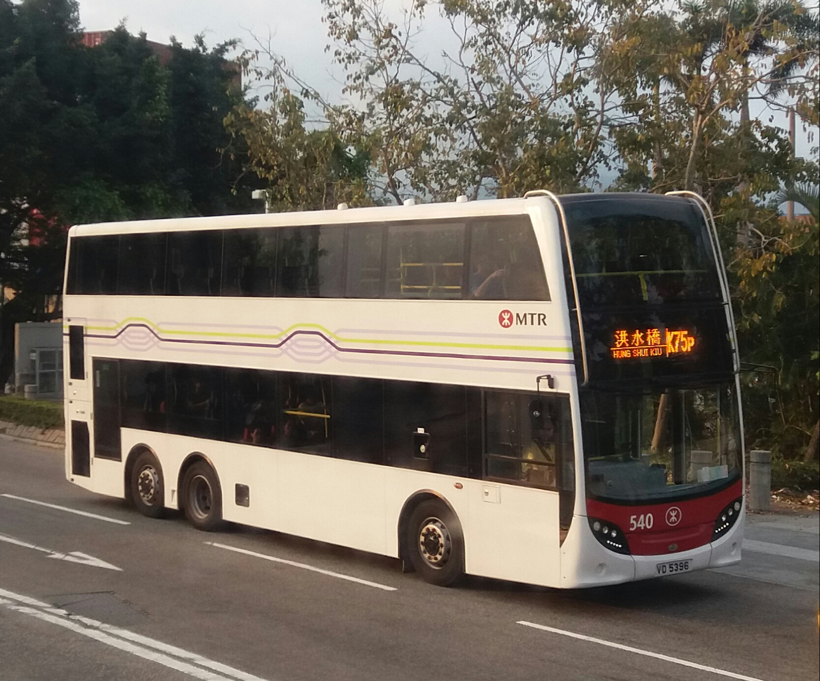 中文（香港）: 港鐵巴士K75P線，正途經屏廈路前往洪水橋